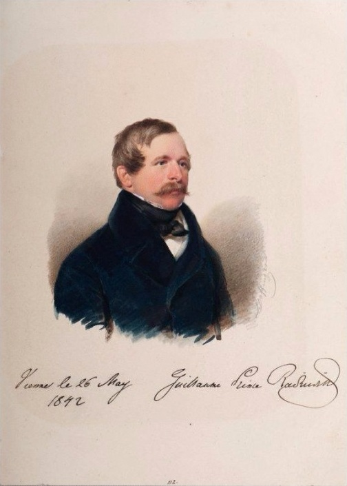 Wilhelm Radziwiłł